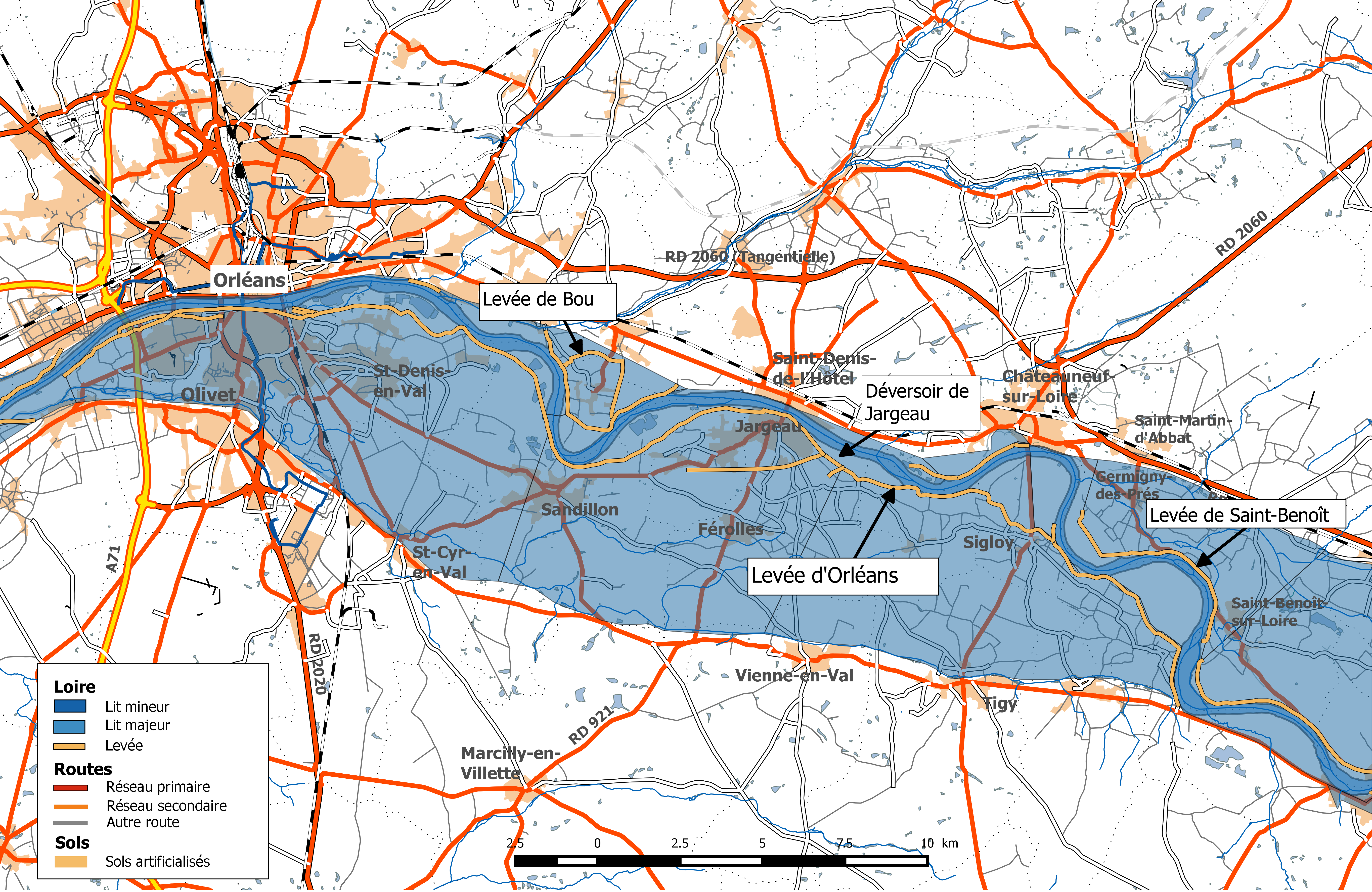 Système d'endiguement de la Loire dans le département du Loiret. Vals d'Orléans.